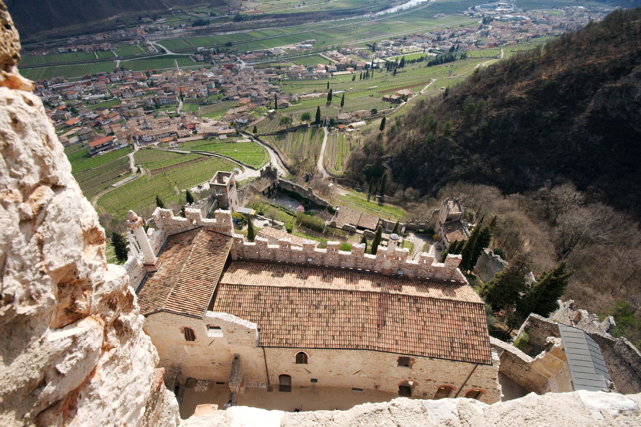 Il castello di avio. Avio, Trentino-Alto Adige. – Vista della castello dalla torre dell'amore. ("Il castello di Avio dall'alto")